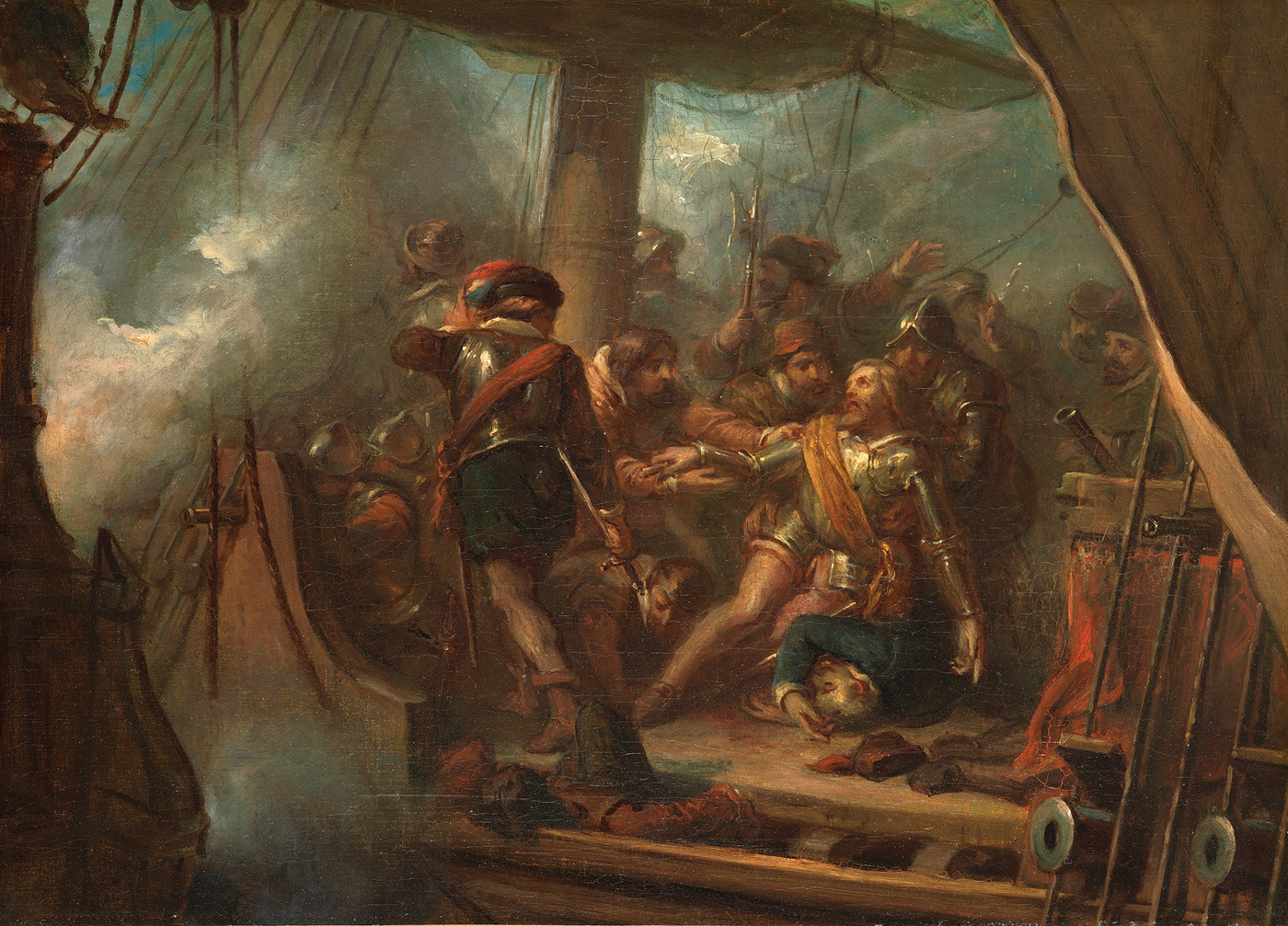 schilderij; Vos, Jacob de; geschiedenis (iconografie)